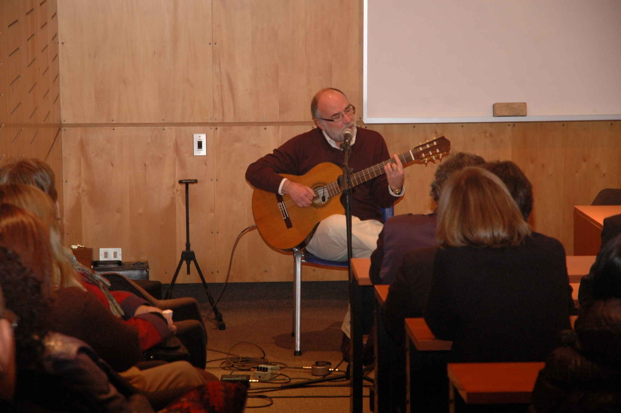 Como un “ave fénix”, así describen a esta ciudad acostumbrada a los desastres naturales desde su misma fundación, sacando a relucir su enorme capacidad de reinventarse, así como de formar a numerosos intelectuales, quienes han enriquecido el panorama cultural de Chile. Eduardo Gatti, escritor en residencia de la Facultad de Letras, se hizo presente con su música y experiencia vivida tras el terremoto.